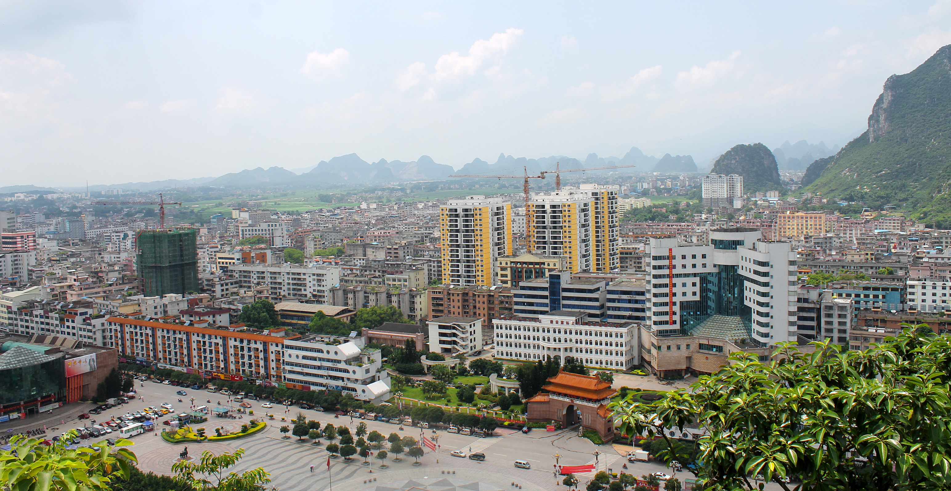 贺州市一角